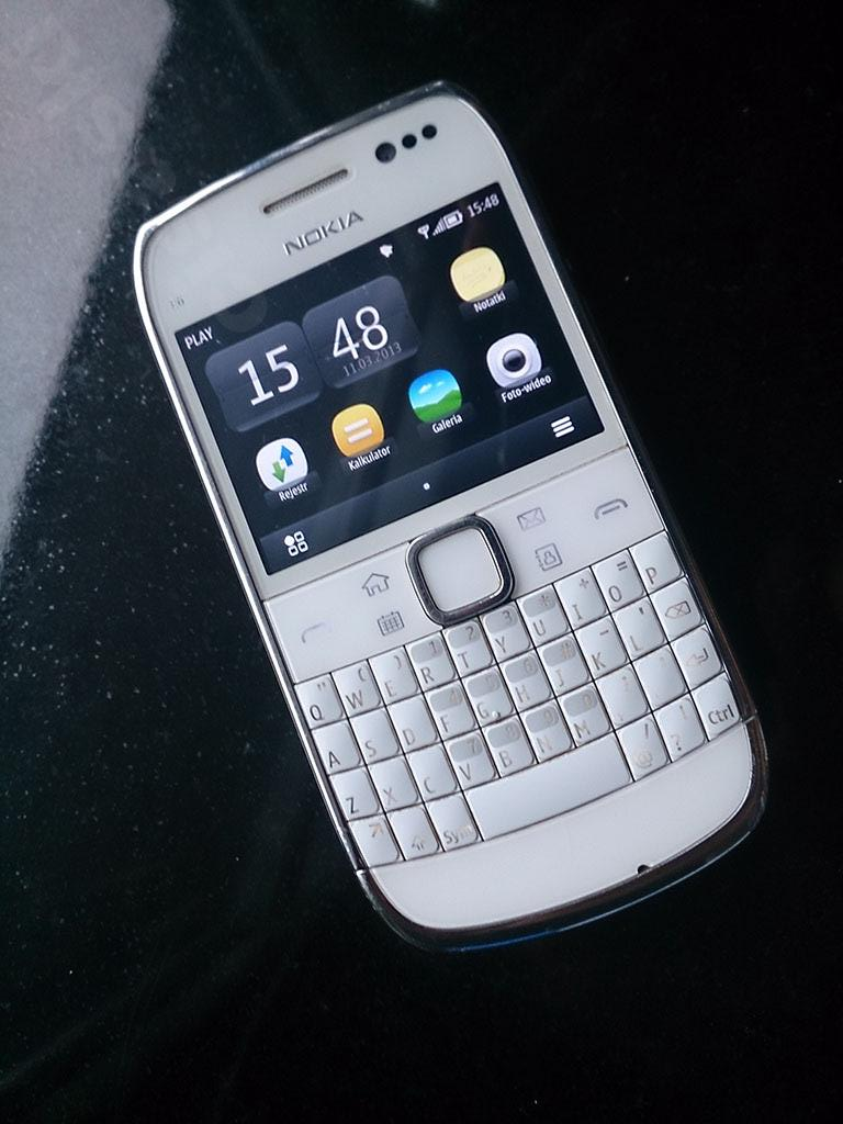 Biała Nokia E6-00